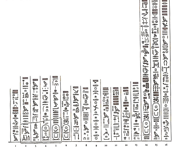 Description par son inventeur d'une clepsydre dans la tombe d'Amenhotep I (règne d'Amenhotep I)